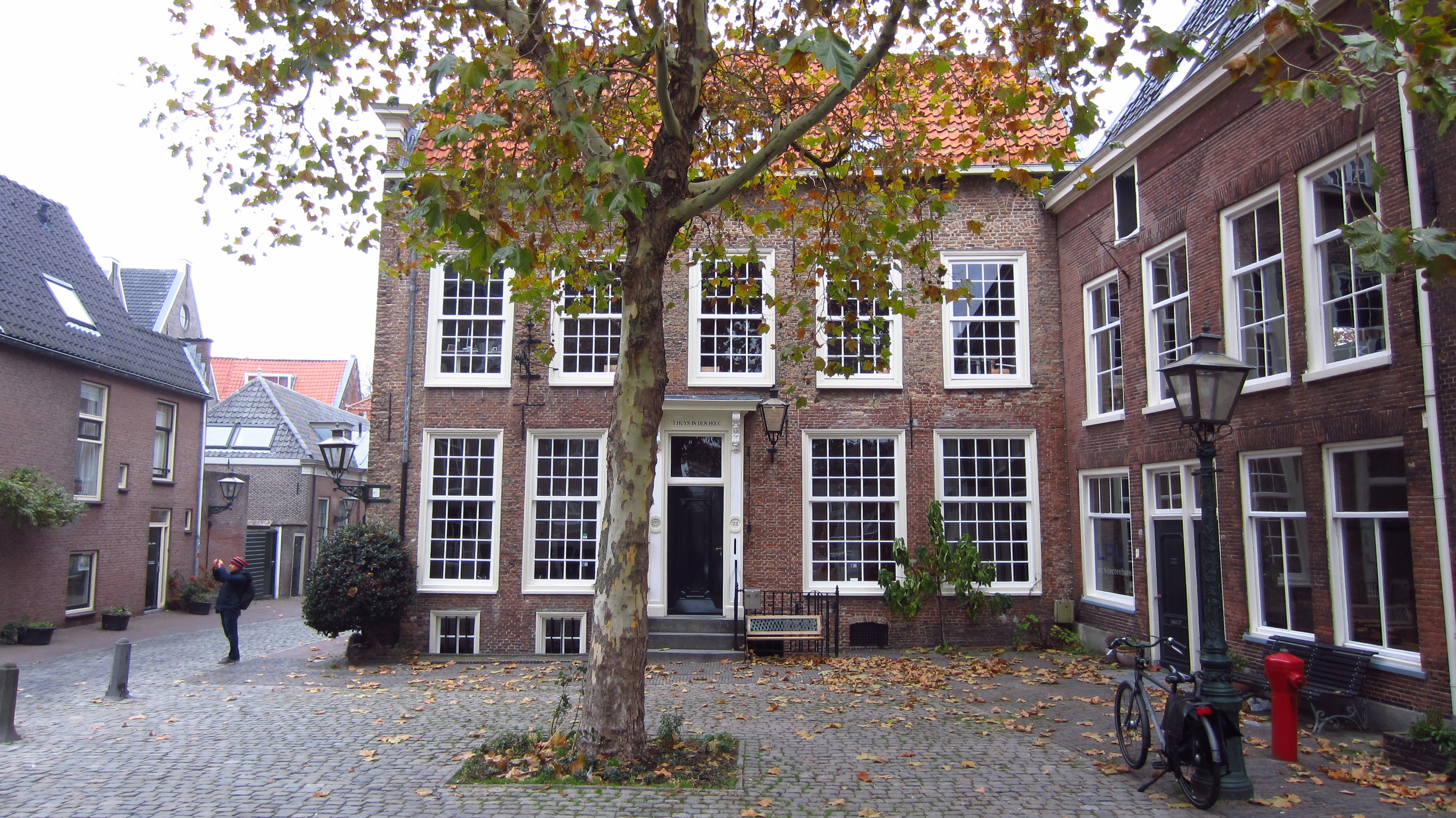 't Huys in den Houc (Pieterskerkhof 22, Leiden)